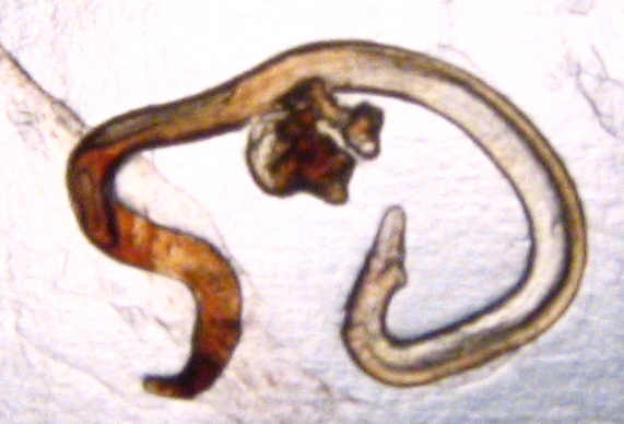 Ver parasite (nématode), intégré à la paroi (ici transparente) de l'estomec d'un hémitriptère atlantique. Photo prise par Matthieu Godbout, aux Îles-de-la-Madeleine, à l'automne 2006.